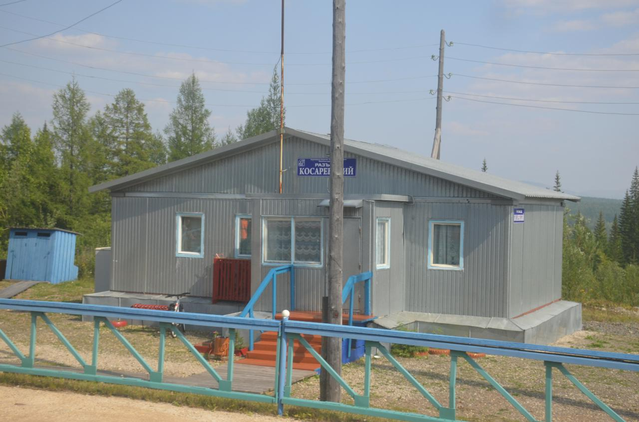 Поездка 5-6 августа 2019 г. по маршруту Якутск - Нерюнгри - Якутск во вновь назначенном поезде № 327 Нижний Бестях - Нерюнгри. Историческое событие - пуск пассажирского движения поездов из центральной Якутии, почти из Якутска.Железнодорожный разъезд Косаревский